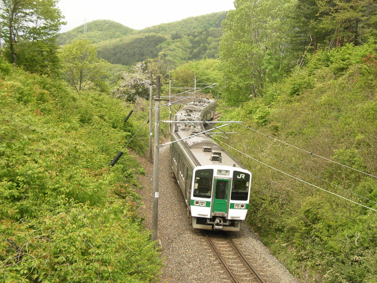 Senzan Line. Sendai, Miyagi prefecture, Japan.